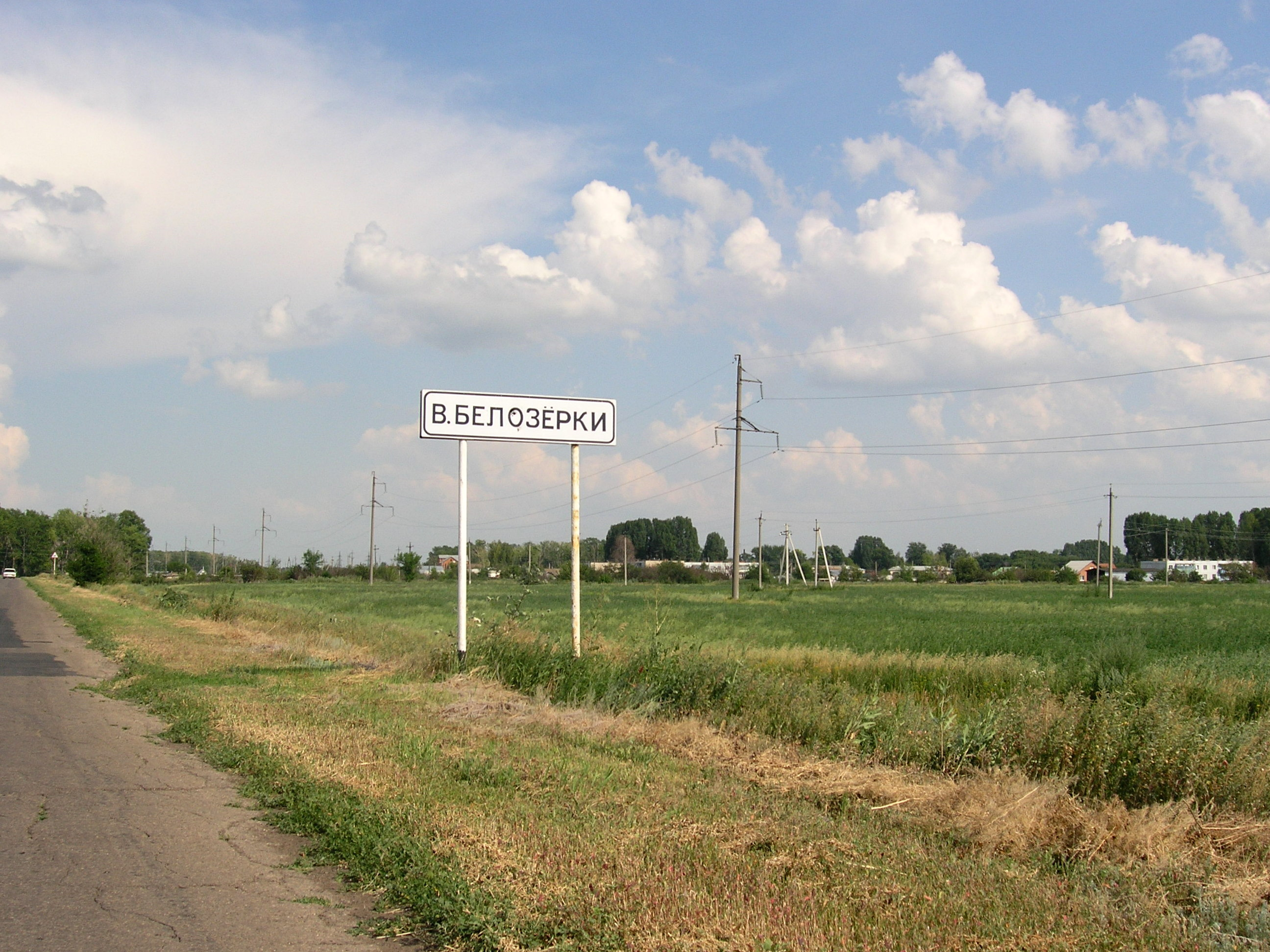 Дорожный знак - Верхние Белозёрки, Ставропольский район, Самарская область, Россия